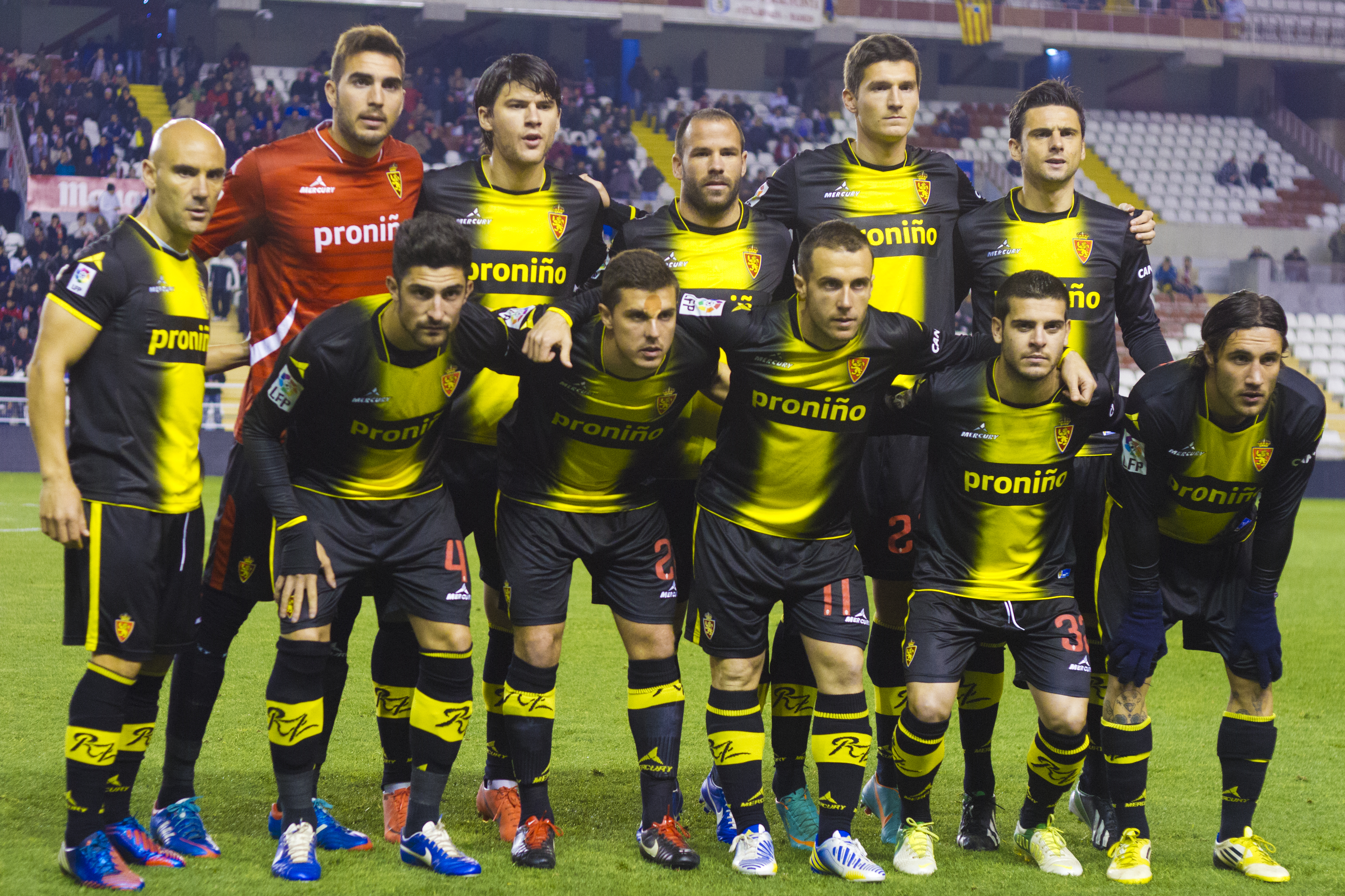 rayo vallecano vs real zaragoza